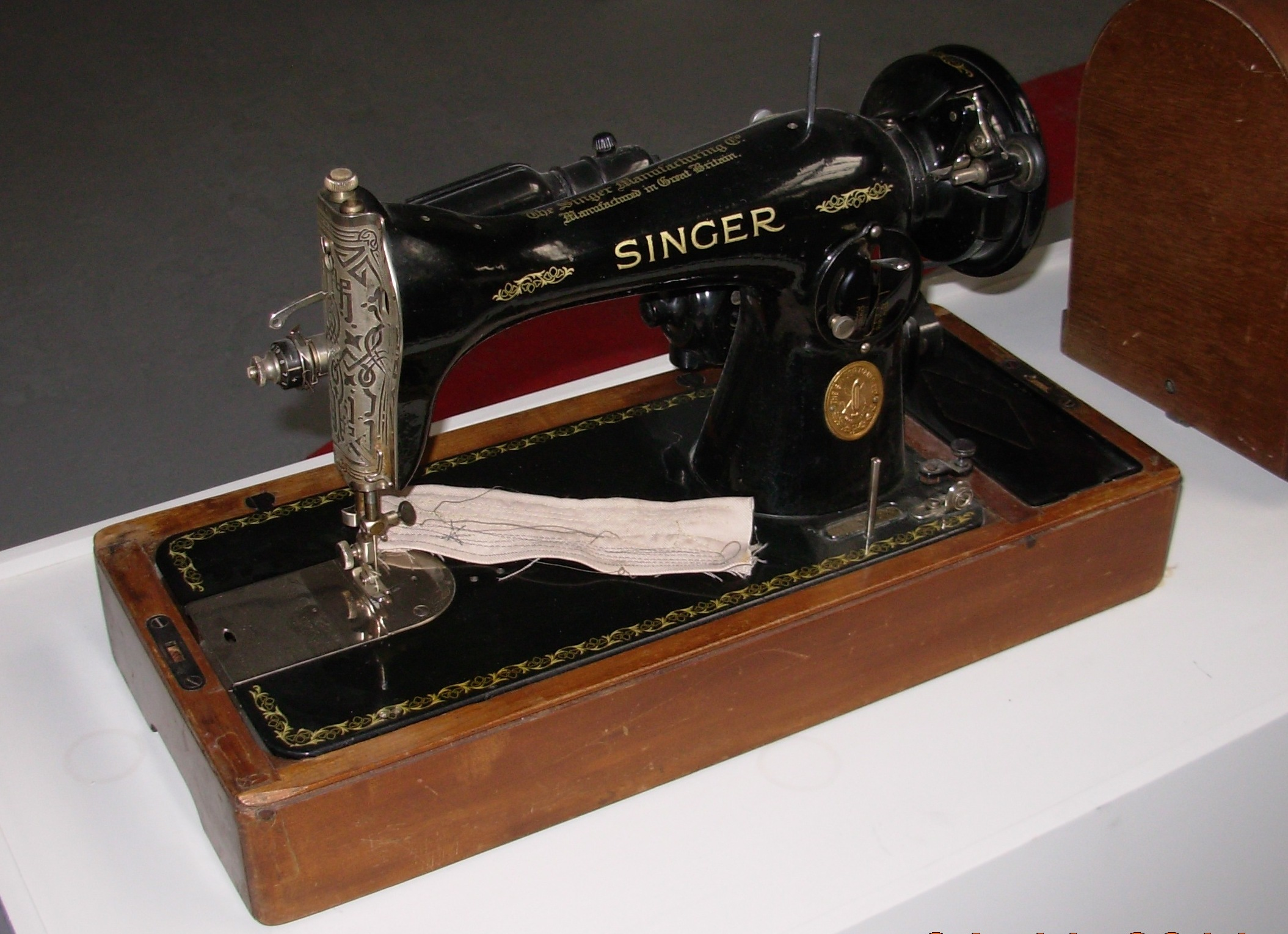 Сингер - шиваћа машина, прва половина 20. века, Музеј науке и технике Београд, Сликао Голдфингер